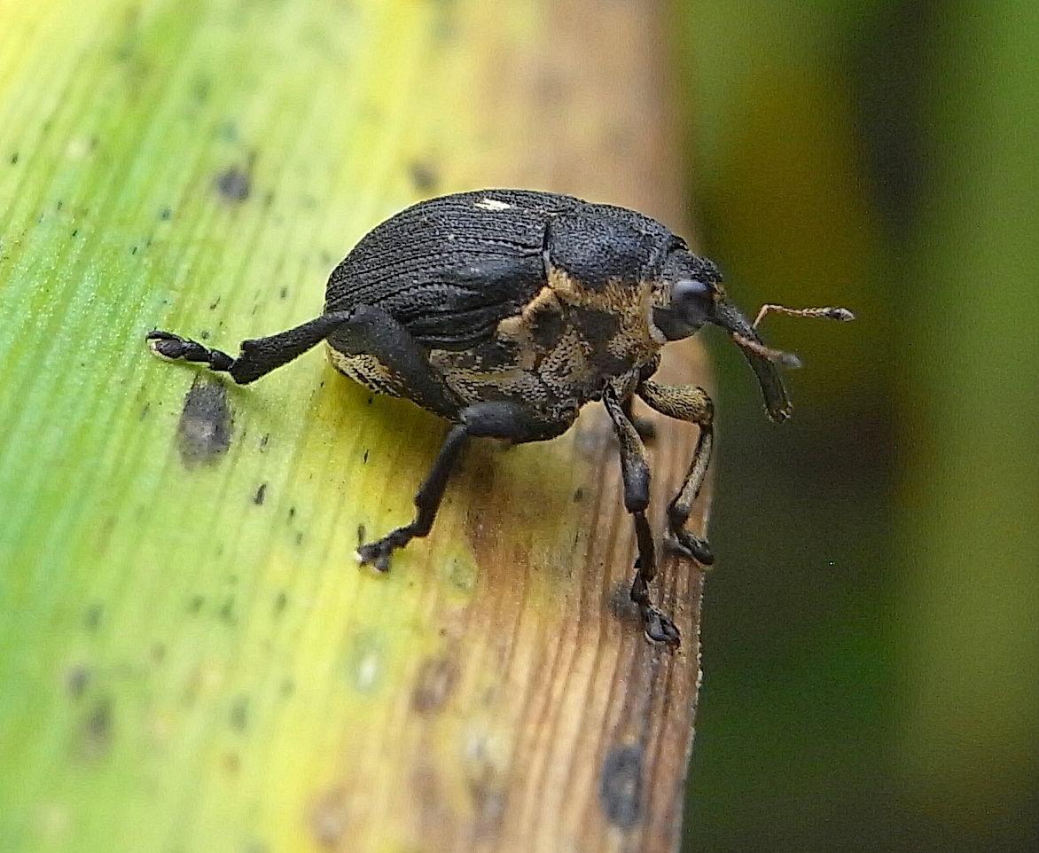 Mononychus punctumalbum aus Süddeutschland, auf Blatt von Iris pseudacorusRicoh R8